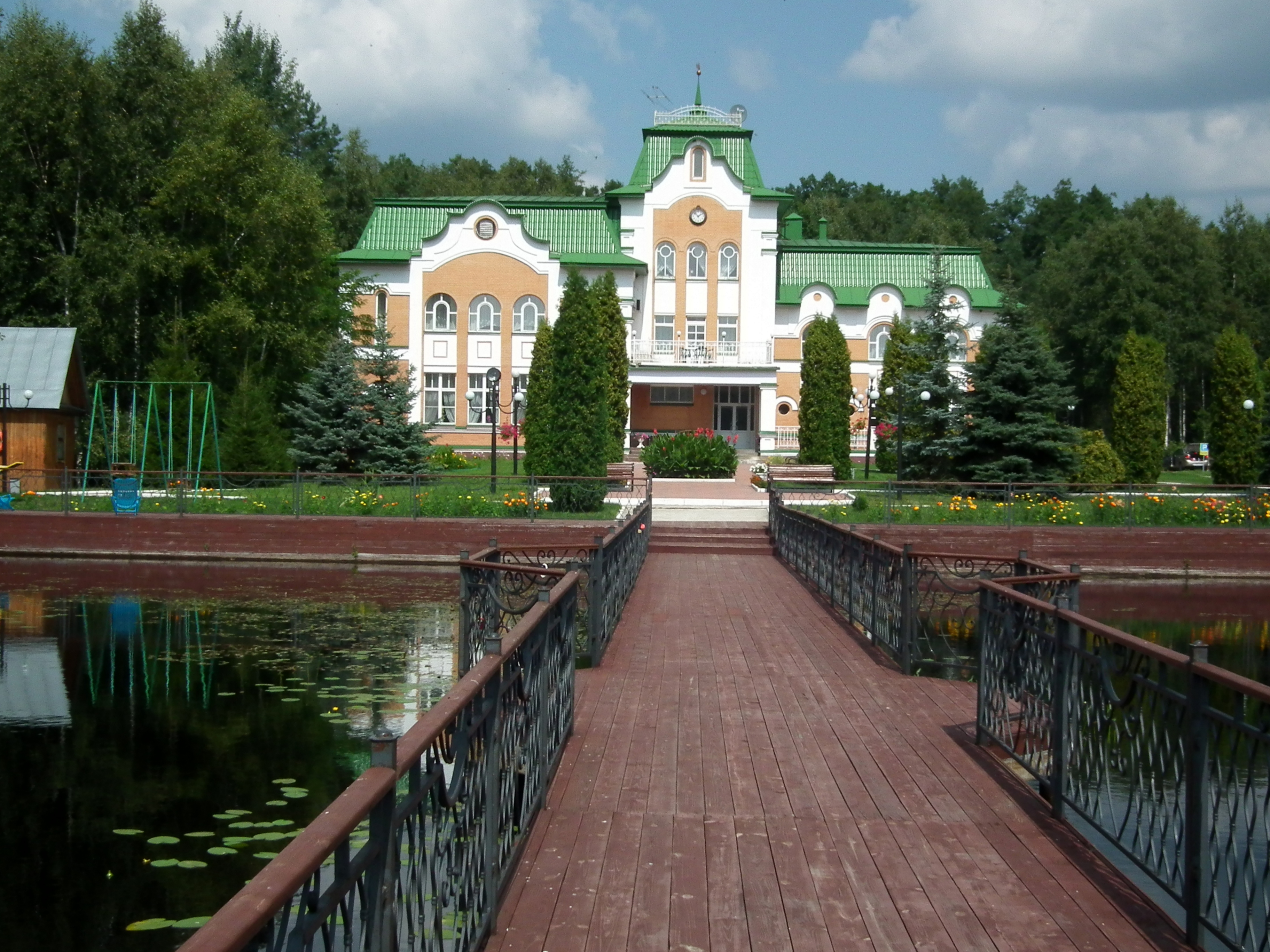 курорт-отель в Орловском полесье